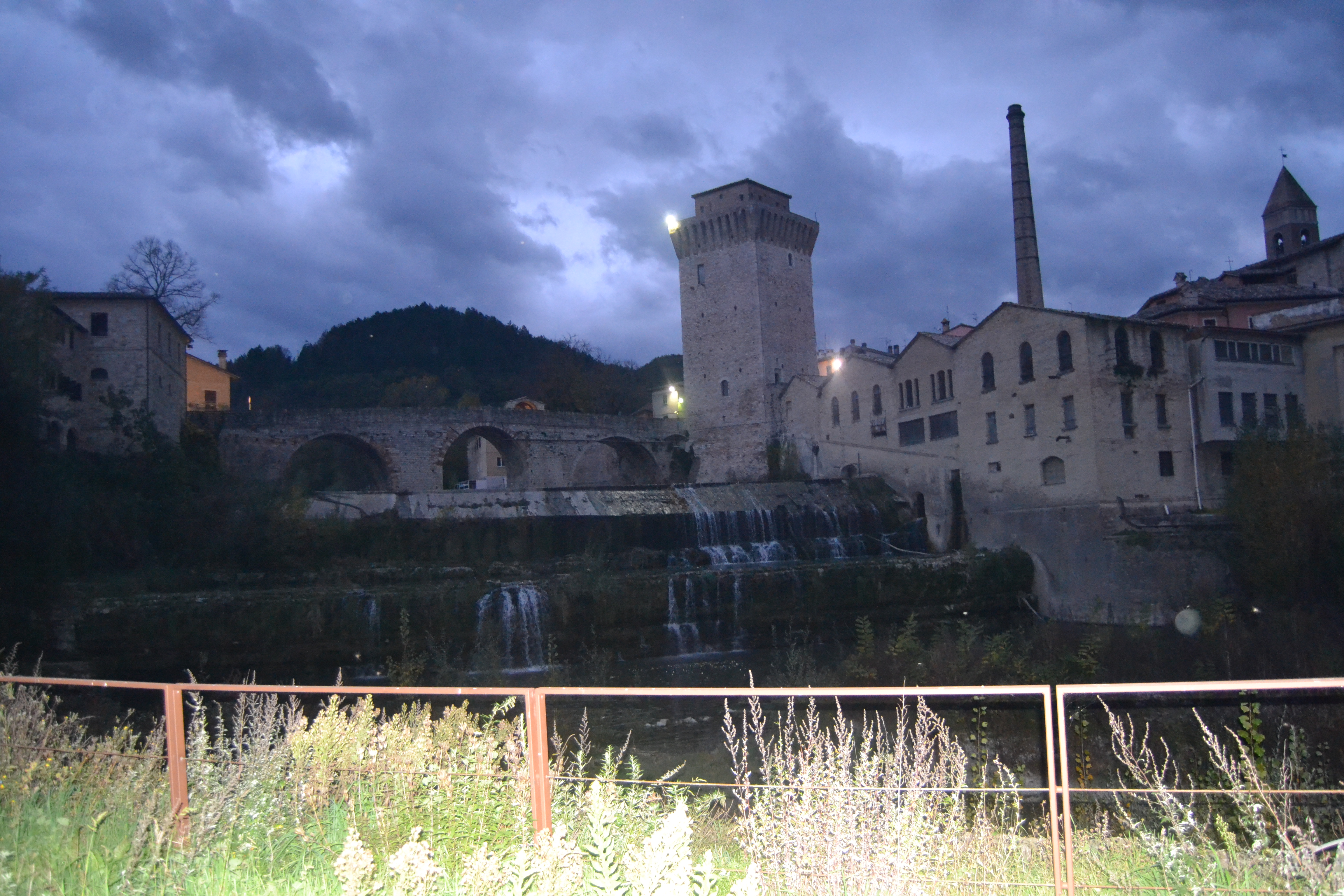 le pont et la tour